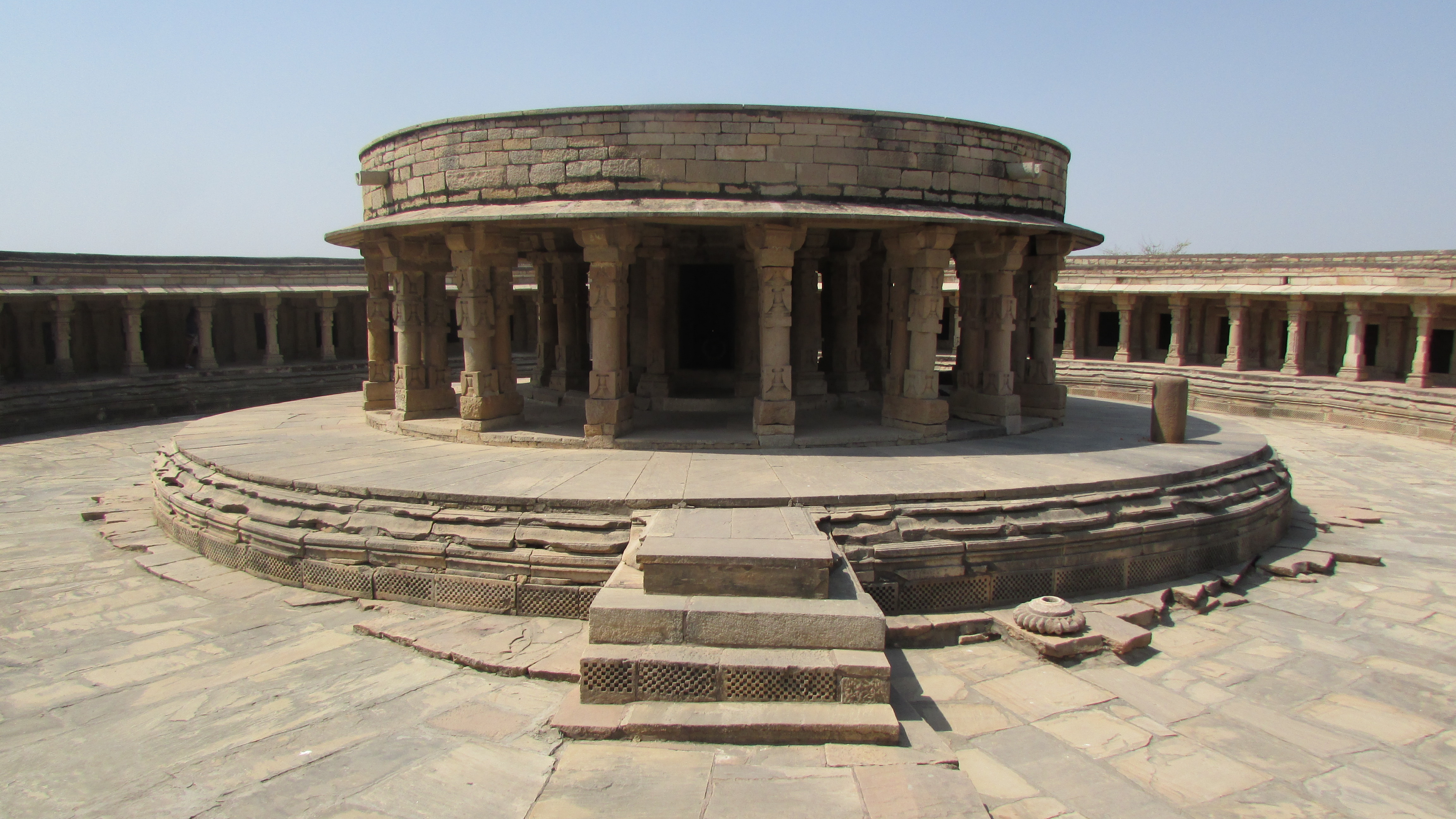 मुरैना का चौसठ योगिनी मंदिर मध्य प्रदेश के मुरैना जिले में मितावली नामक जगह स्थित एक प्राचीन मंदिर है।